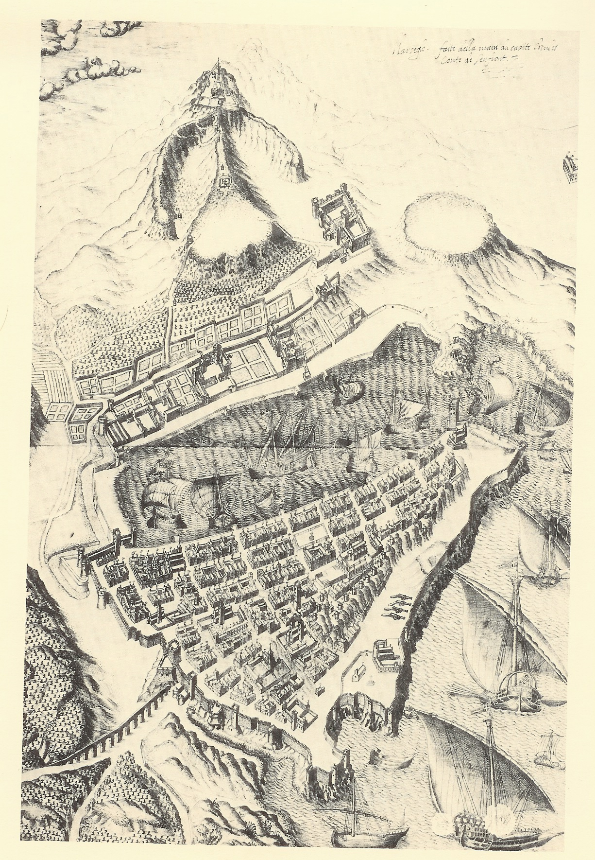 Plan établi probablement en 1591. Dessin à la plume de 71x46cm aux archives d'État de Turin. 1591